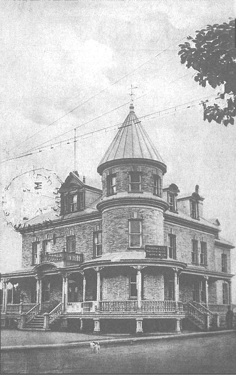 La Pharmacie Les Bains de J. Gauvreau (carte postale de J. O. Vallée de Rimouski) - (image provenant de L'Estuaire 2002 NO-2)